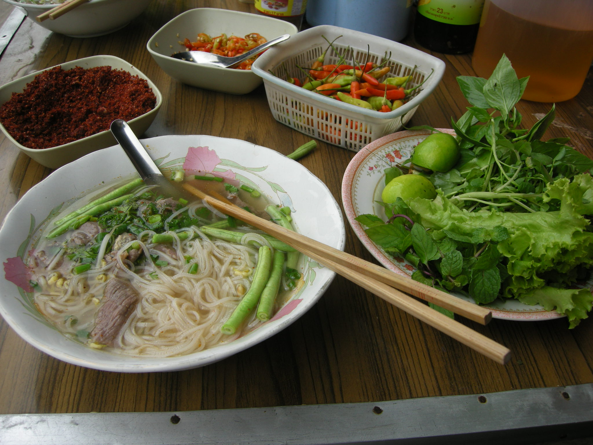 Lao noodle, Luang Prabang, Laos